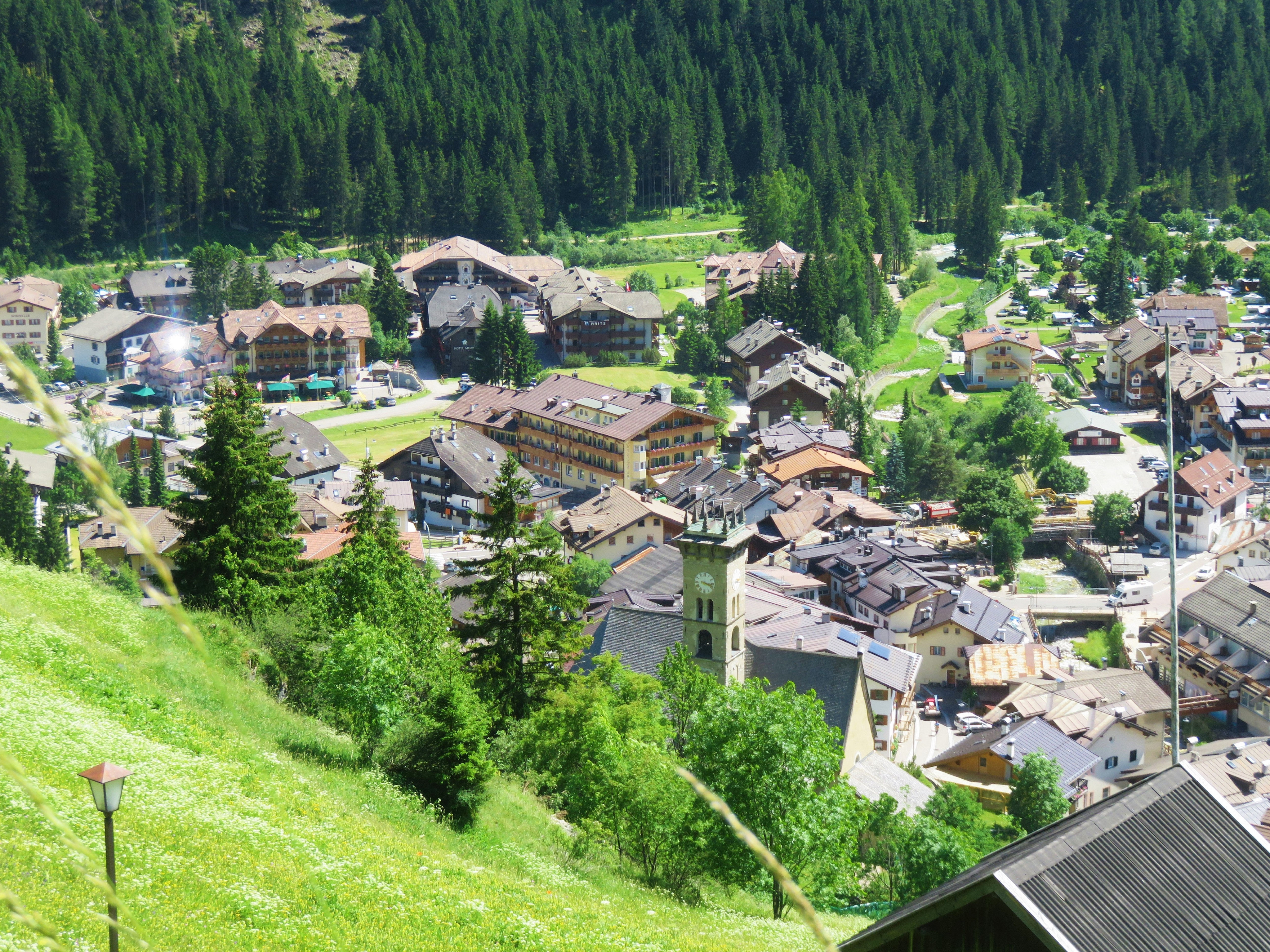 Panorama dalla frazione di Pian. In primo piano la chiesa dei Santi Filippo e Giacomo.